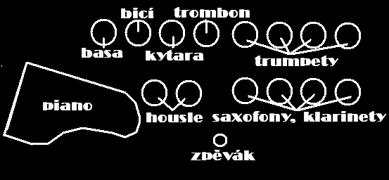 Melodymakers stage plan.PNG のピアノが一般的な形ではないので